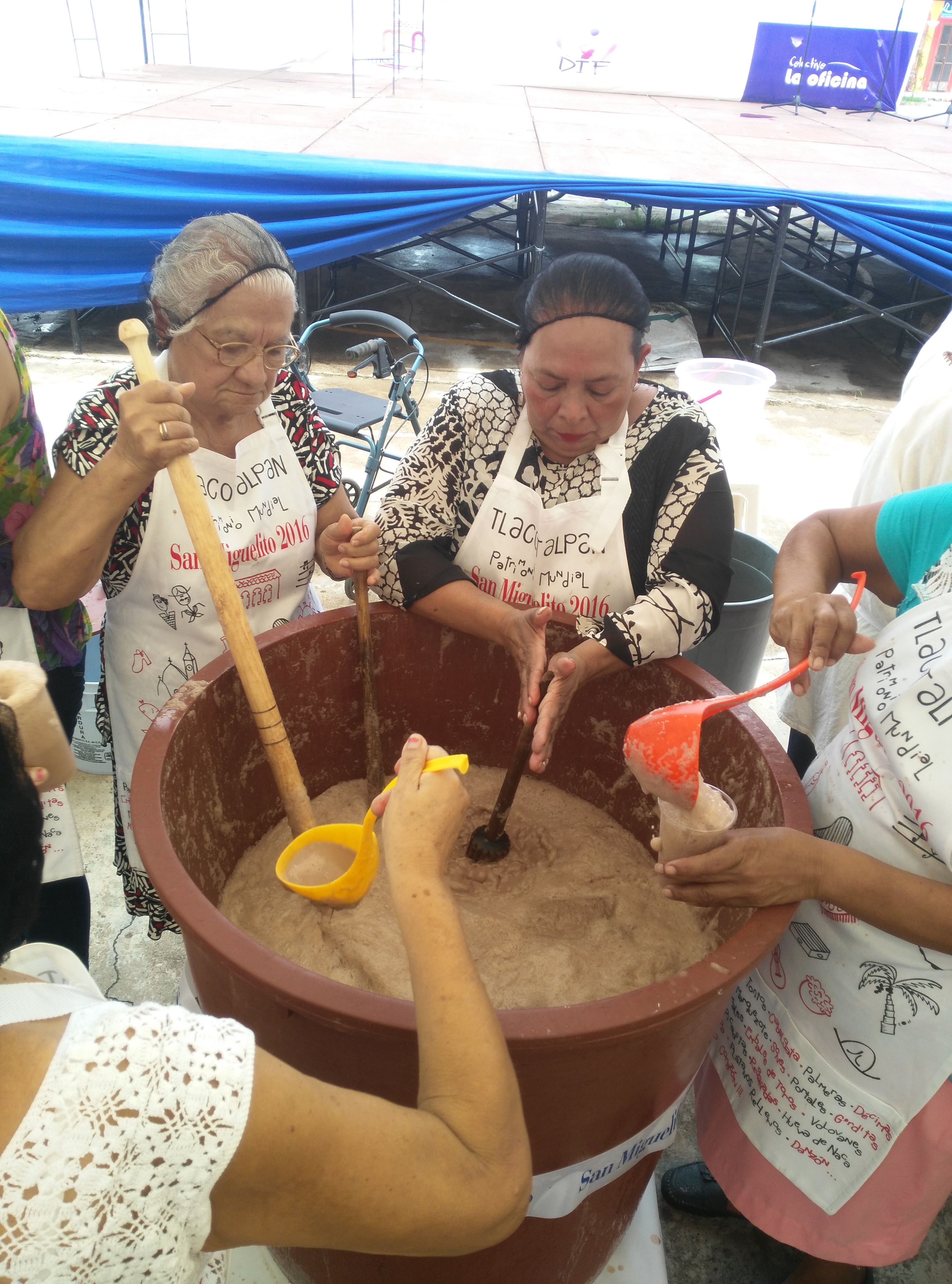 Las señoras preparando el popo en el festival de san miguelito en Tlacotalpan.